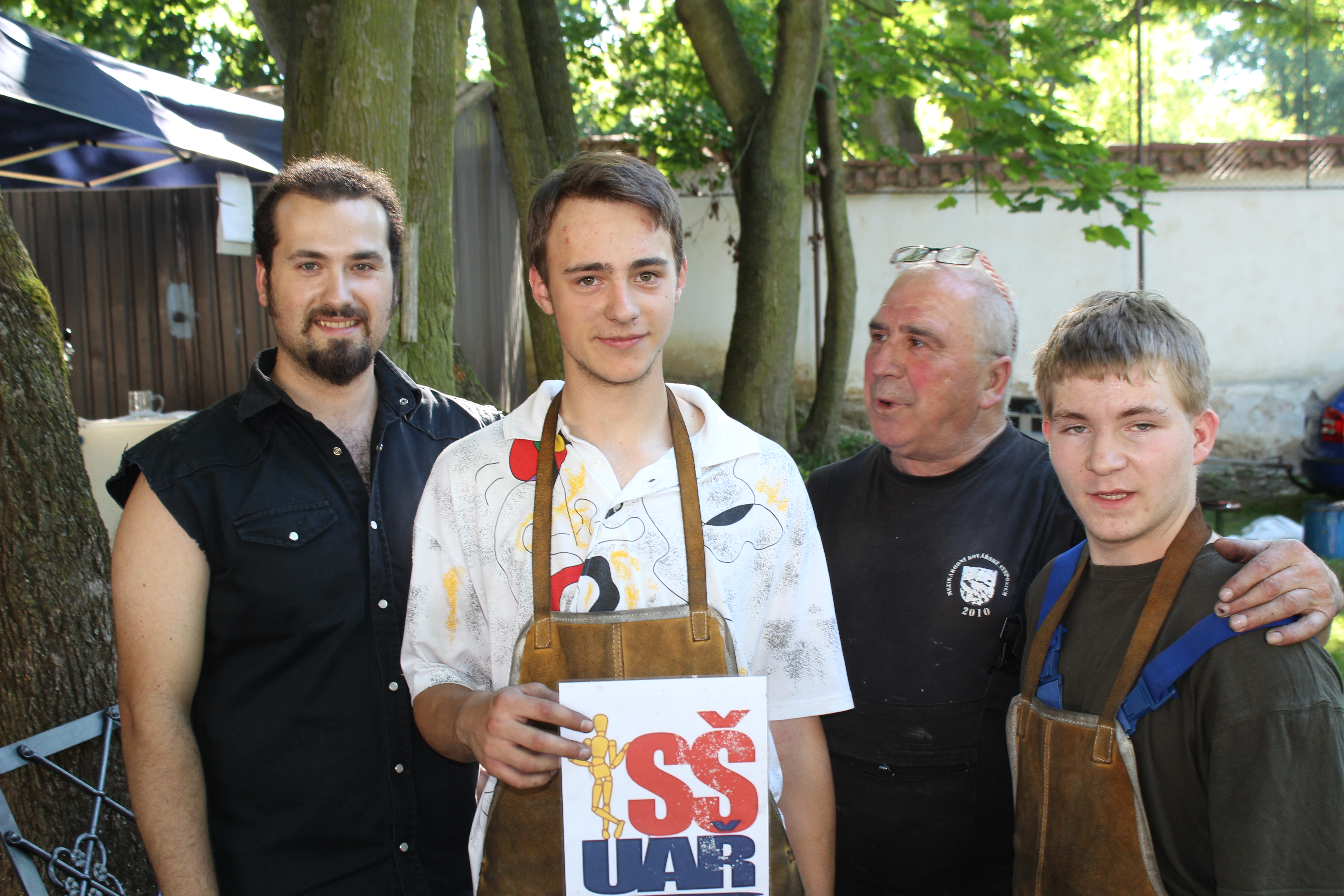 9. Kováři v Litni - Matěj Hlavín a Václav Hradil s mistry Janem Hejnarem a Václavem Kadlecem - Střední škola umělecká a řemeslná v Praze 5 - Zlíchov V Litni (okres Beroun) se o víkendu 7. a 8. 6. 2014 konalo 1. setkání kovářů, podkovářů, dráteníků, klempířů a všech, kteří pracují s kovem s názvem „Kováři v Litni“. Příští „Kováři v Litni“ se konají 6. – 7. 6. 2015 opět v Areálu Liteň a budou spojeni se setkáním absolventů škol, které zde působily: Středního odborného učiliště a Učňovské školy zemědělské, obor kovář – podkovář. Pořadateli jsou Atelier Svatopluk, o.p.s. Liteň a Kovárna pro radost v Kytíně.